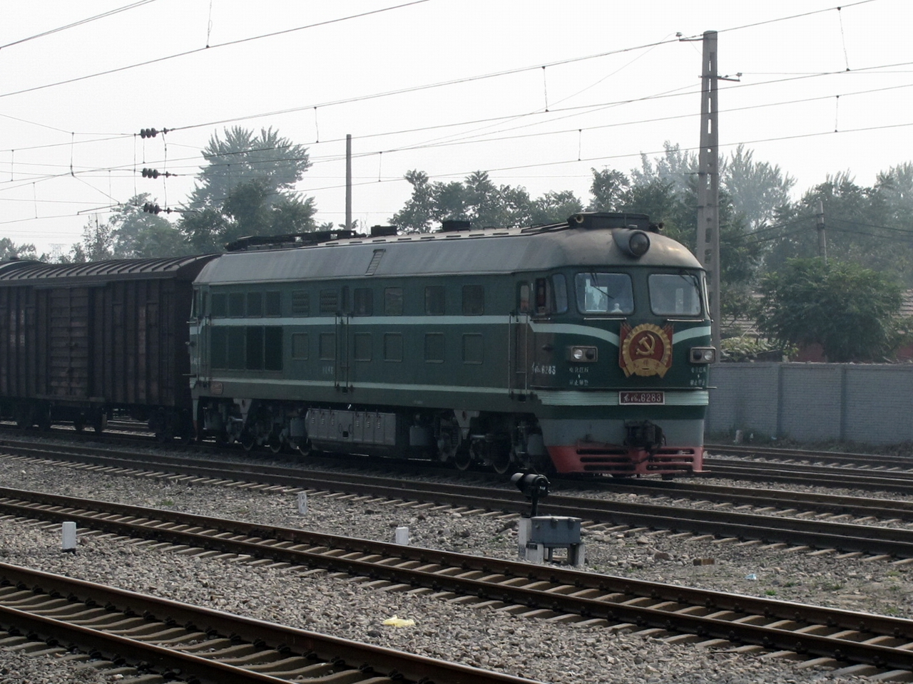 DF4B型6283号机车在沙河车站